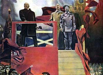 Картина 1918-й. Авторы: Художники Геннадий Мосин и Миша Брусиловский.